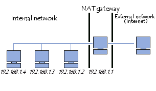 Монгол: Сүлжээний Хаягийн Хөрвүүлэлтийн үндсэн зарчим